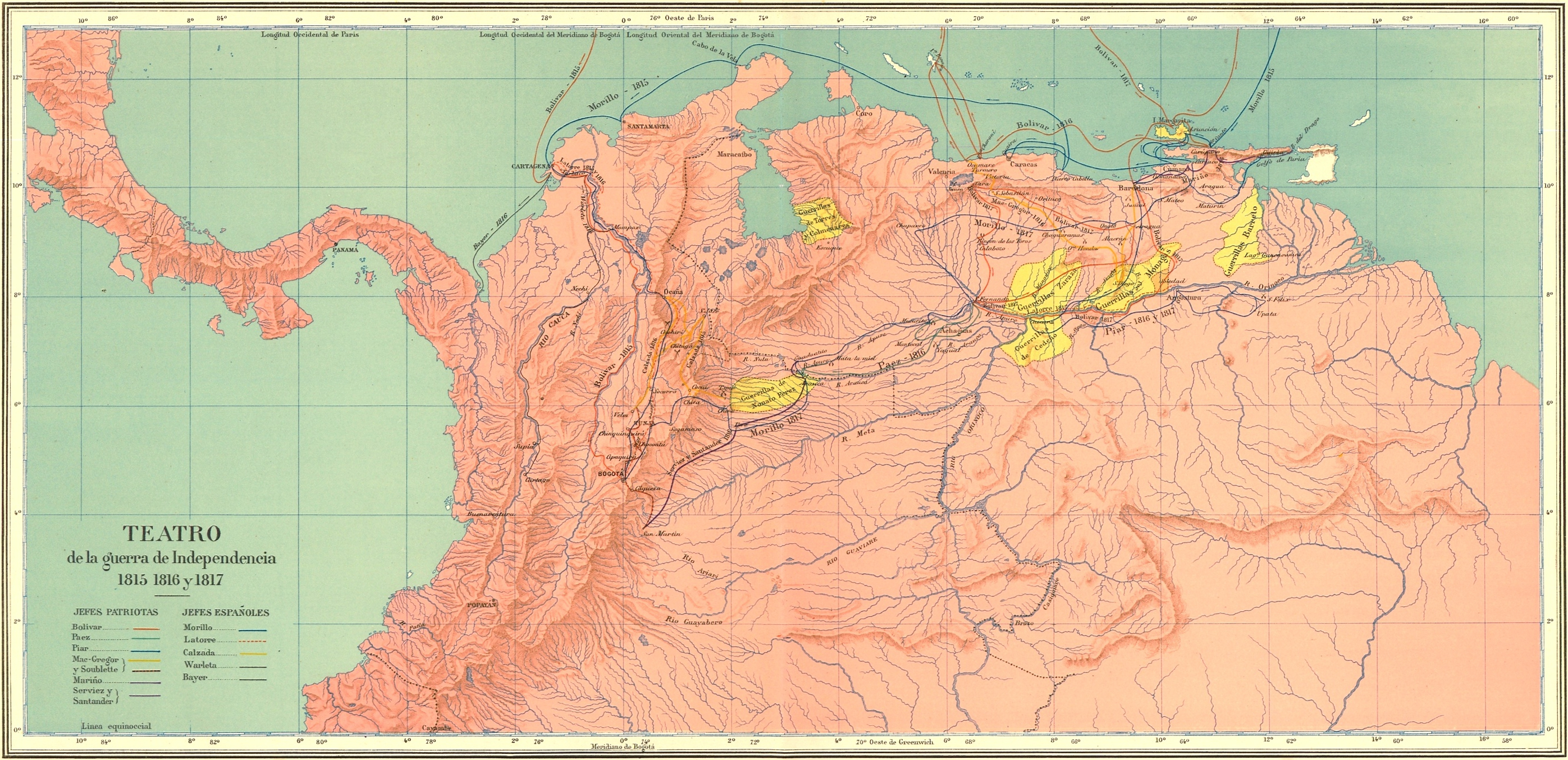 Carta que representa el teatro de la guerra de independencia años 1815 a 1817. Carta VII del Atlas geográfico e histórico de la República de Colombia, 1890.